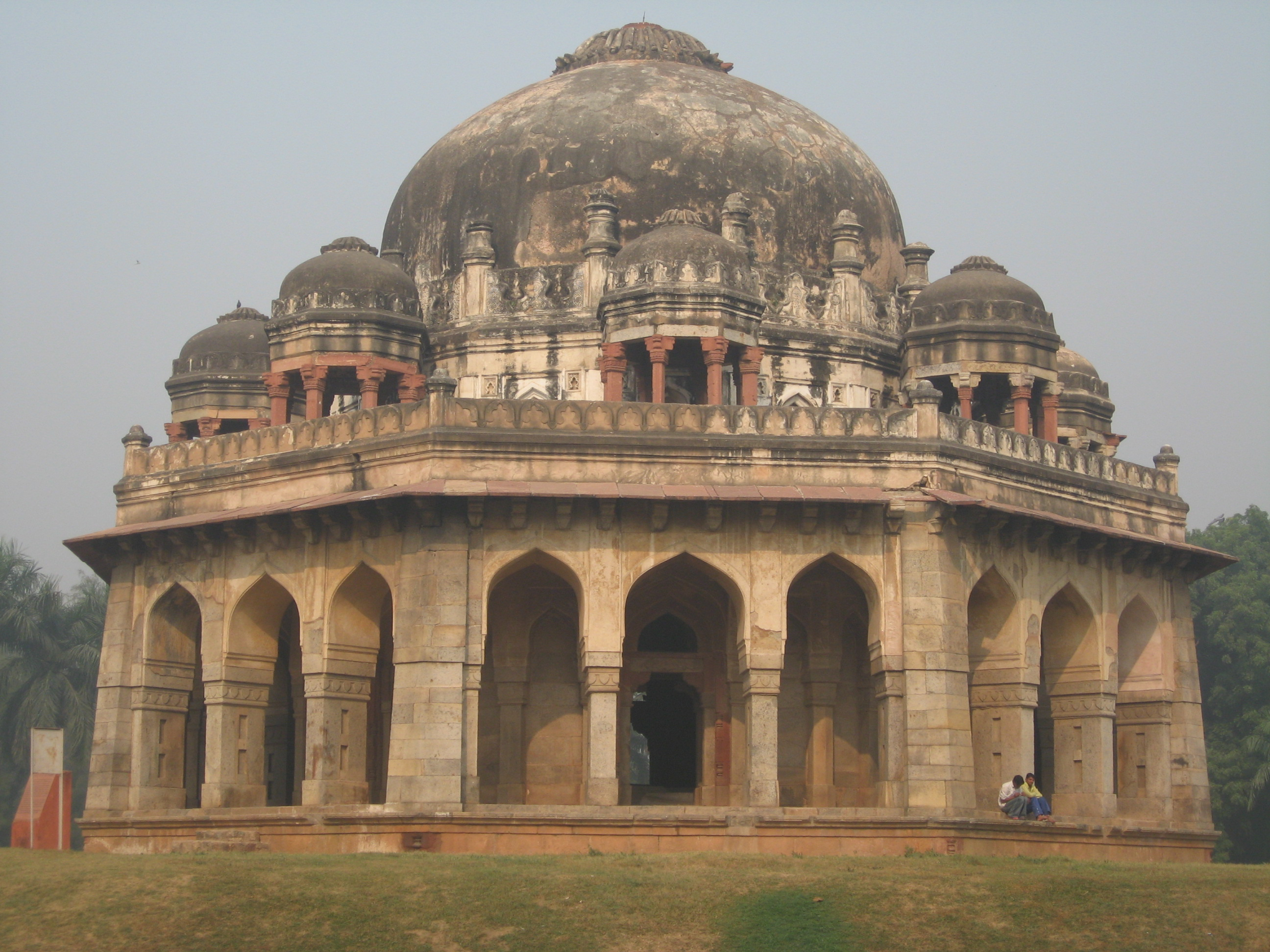 tumb of Mohammed Shah, Lodi Garden, Delhi, India